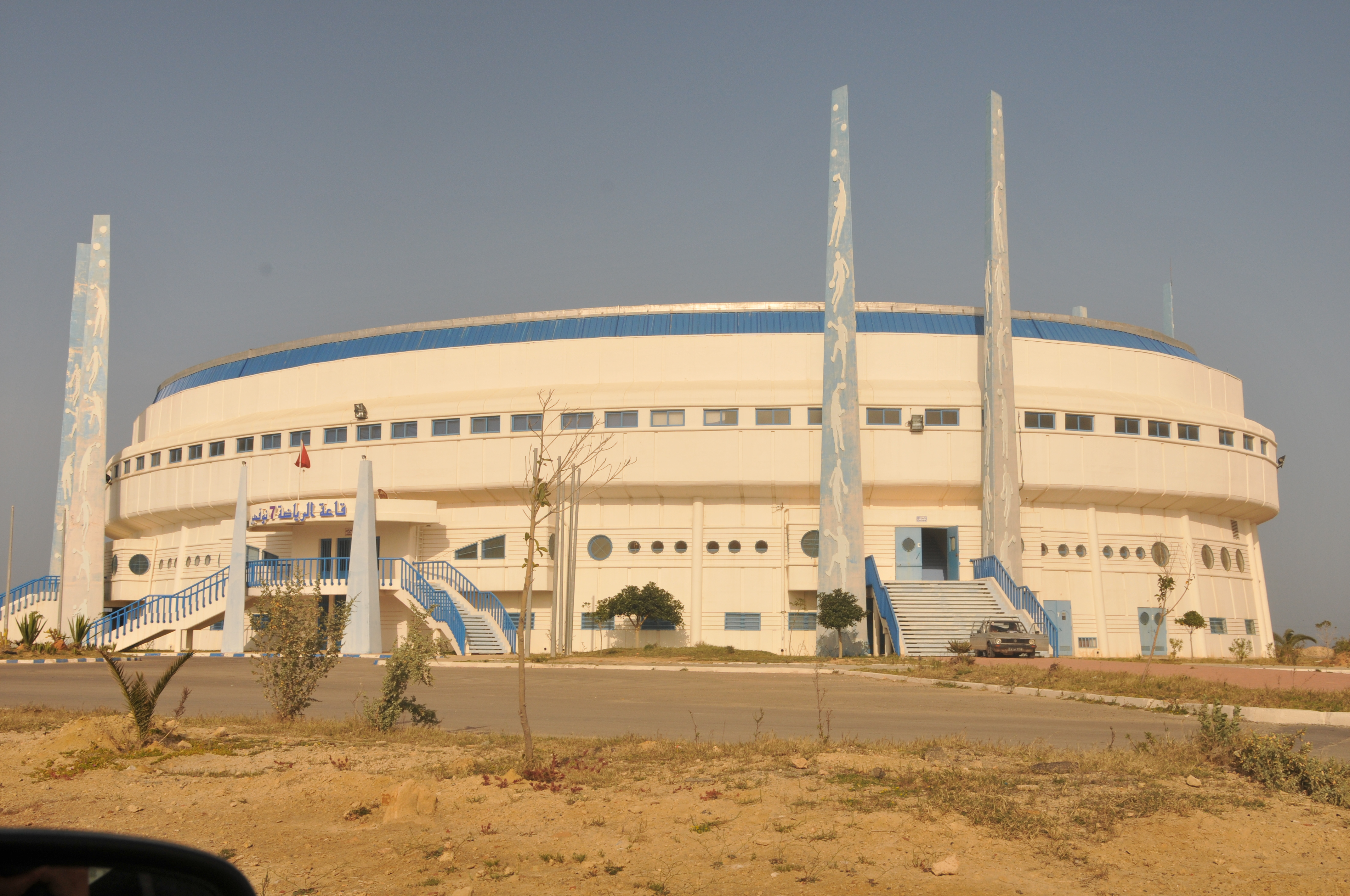 Salle Omnisports 7 Novembre à Monastir, Tunisie